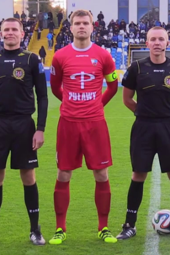 Mateusz Pielach, obrońca i kapitan Wisły Puławy, w towarzystwie sędziów przed rozpoczęciem spotkania I ligi ze Stalą Mielec.